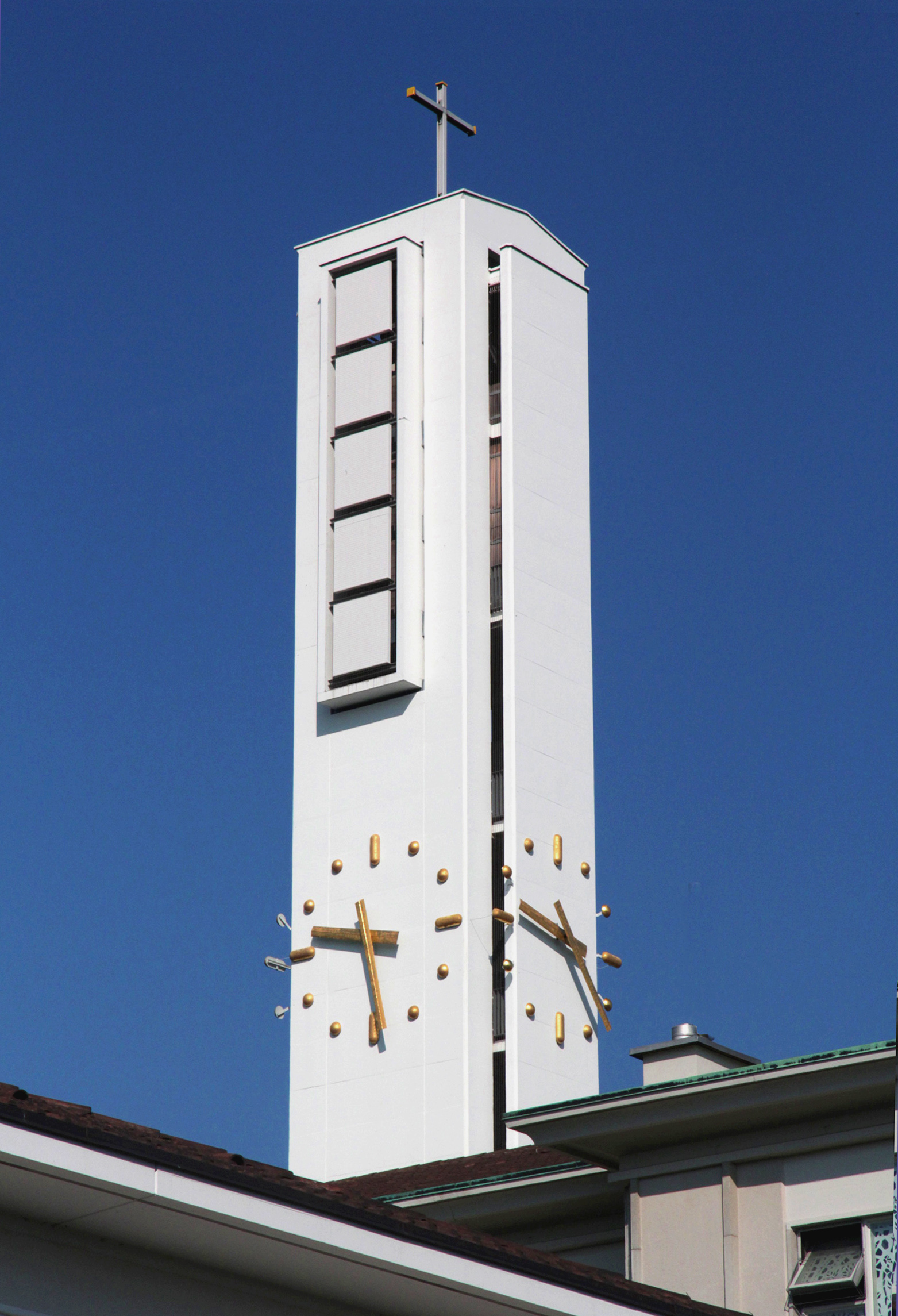 Römisch-katholische Pfarrkirche Maria Frieden Dübendorf, Kirchturm